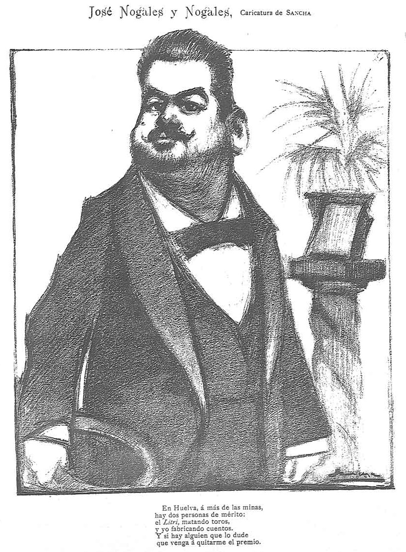 José Nogales y Nogales. En Huelva, á más de las minas, hay dos personas de mérito: el Litri, matando toros, y yo fabricando cuentos. Y si hay alguien que lo dude que venga a quitarme el premio.